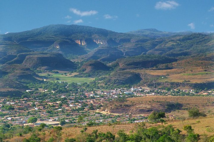 Imagem com vista panorâmica da cidade de Banzaê